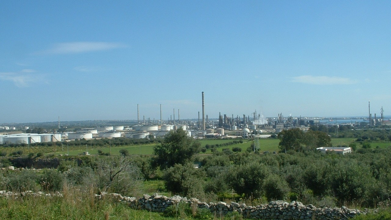 L'impianto ESSO di Augusta, visto dalla S.P. Melilli - Augusta (SR)